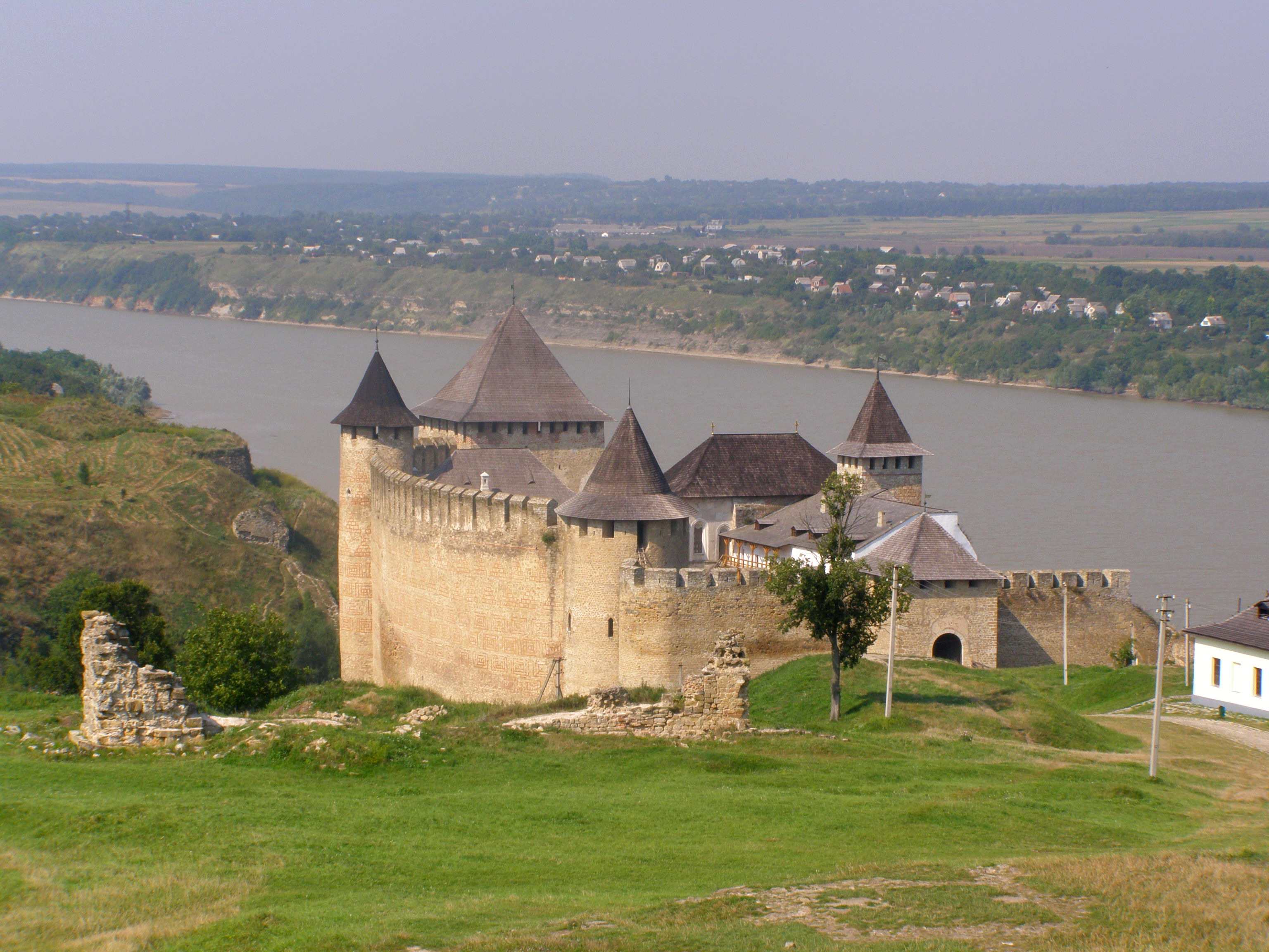 Chotyn, jádro pevnosti, v pozadí Dněstr